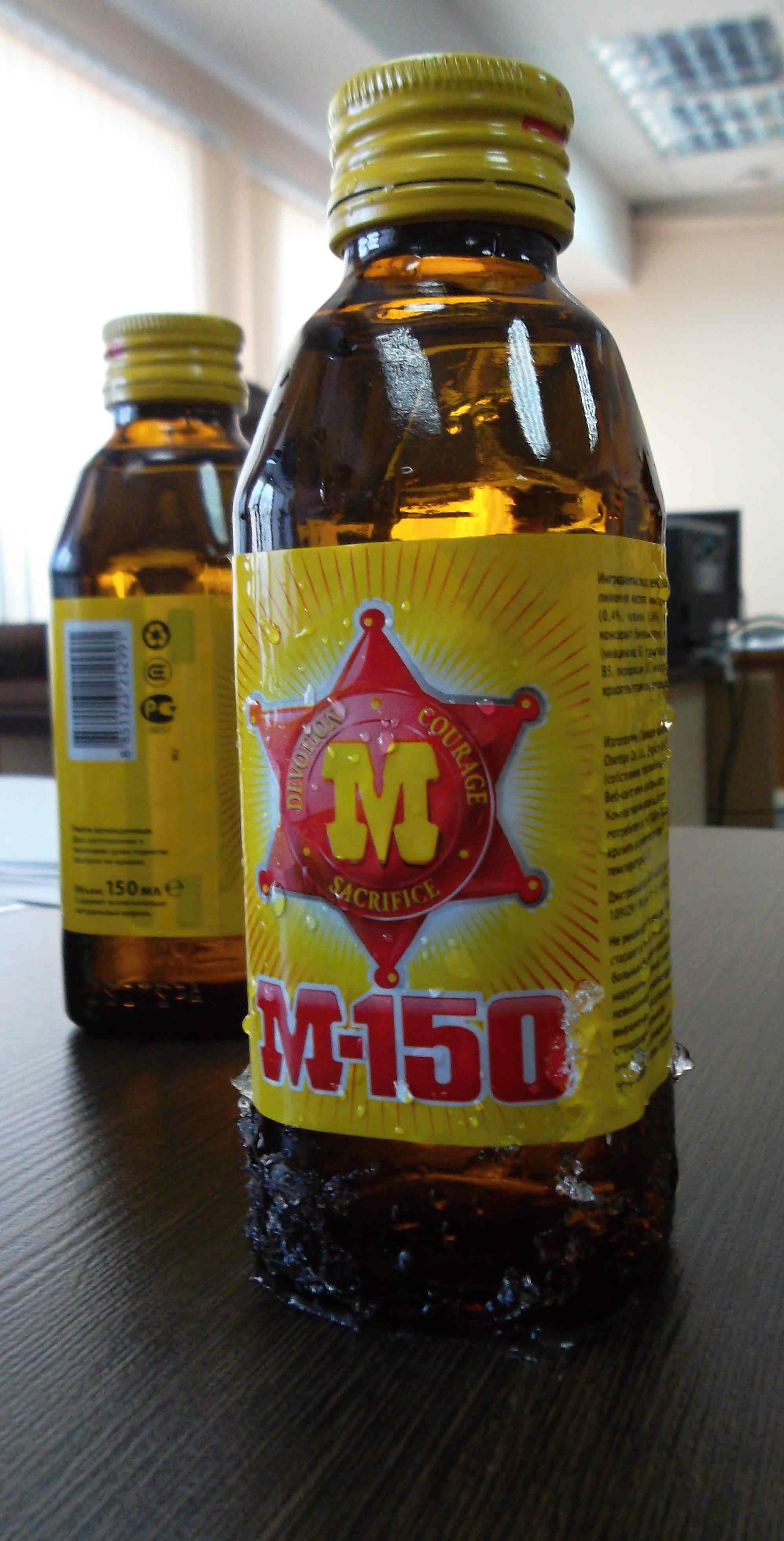 Энергетический напиток М-150 из Таиланда, поставляется в Россию с 2011 года компанией "Азия Н". Для офисной жизни и не только.